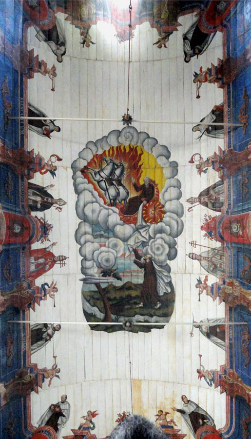 Igreja de Nossa Senhora do Carmo. Forro pintado por Joaquim Gonçalves da Rocha.